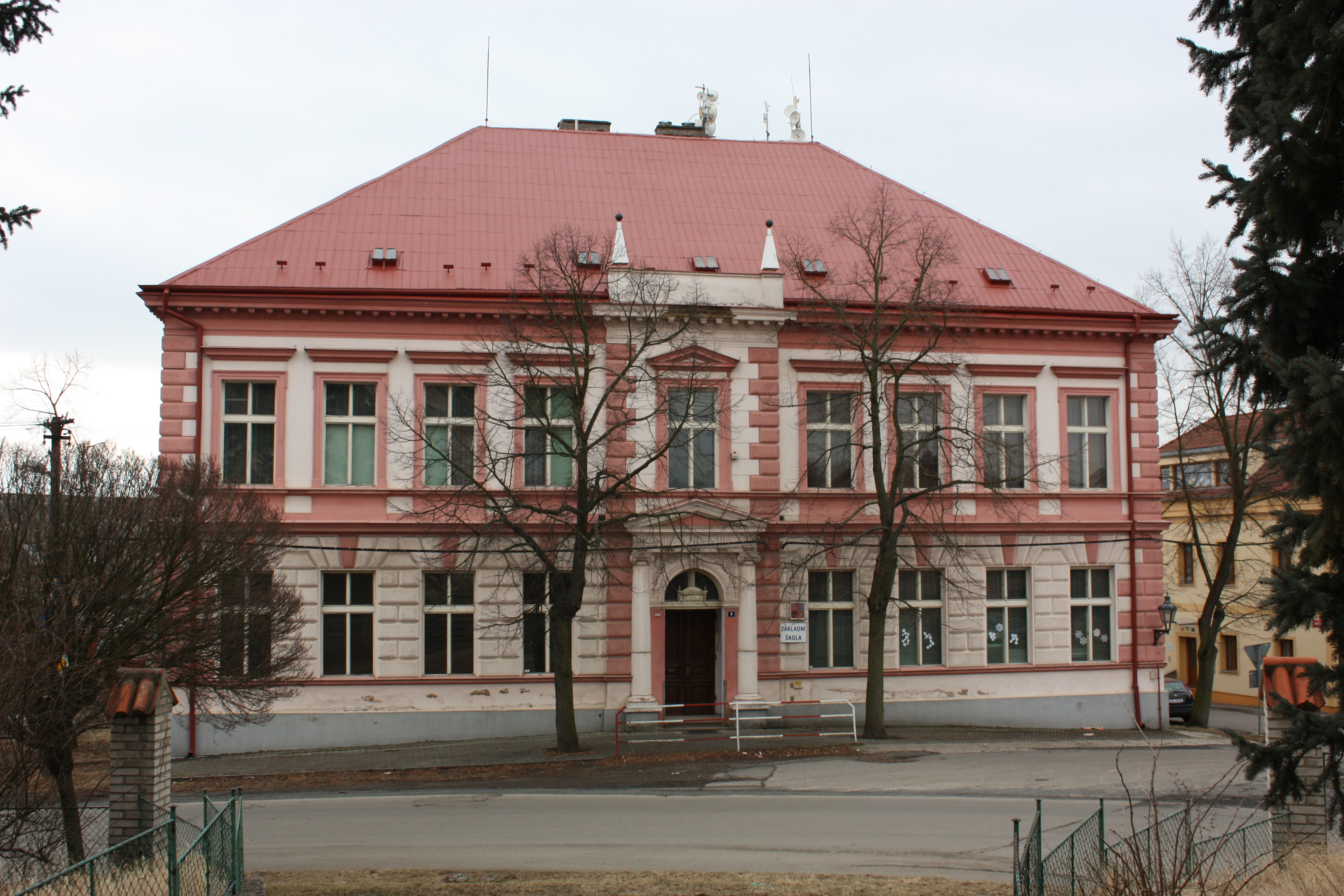 Základní škola v Rudné-Hořelici (okres Praha-západ), 5. května 583/8.